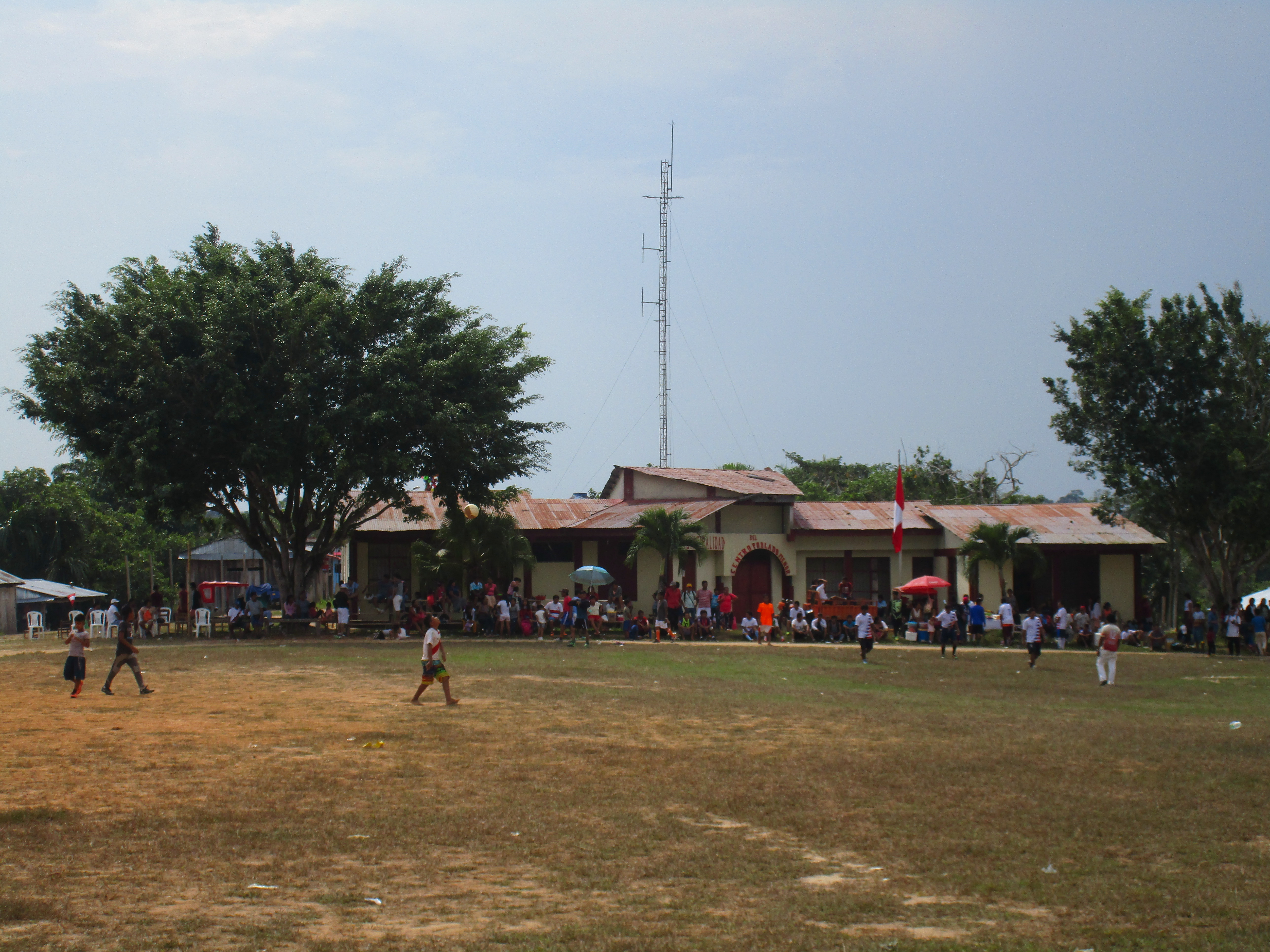 San Joaquín de Omaguas en Maynas, Loreto. Perú